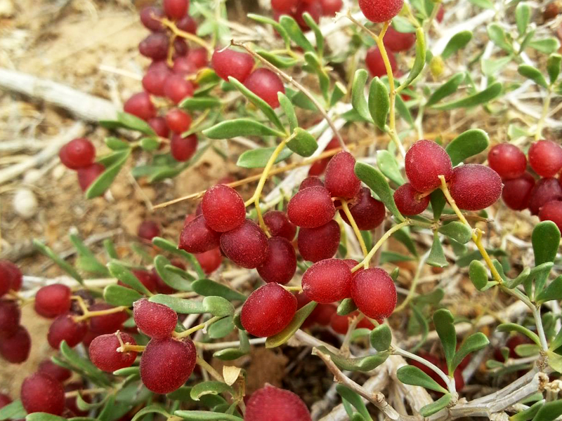 Монгол: Хармаг